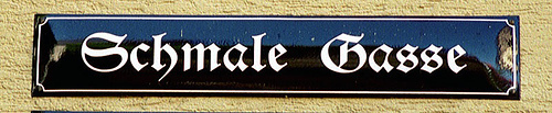 Straßenschild mit falscher Benutzung des Rund-s. Bei gebrochenen Schriften ist auch die Benutzung des langen s im Deutschen notwendig ("Gaſſe" statt "Gasse").